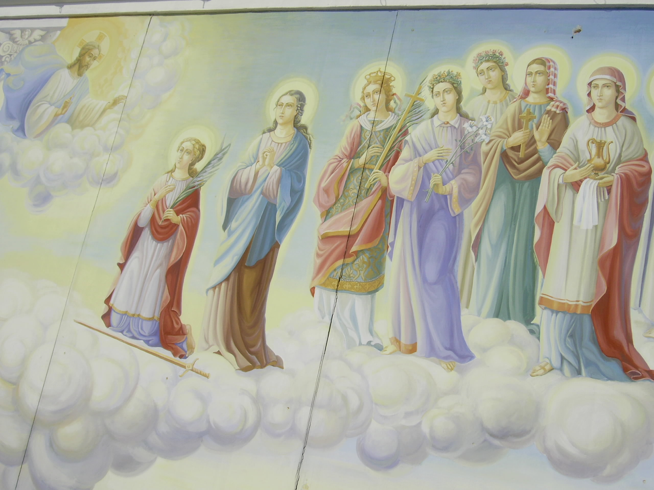 Комплекс Михайлівського Золотоверхого монастиря